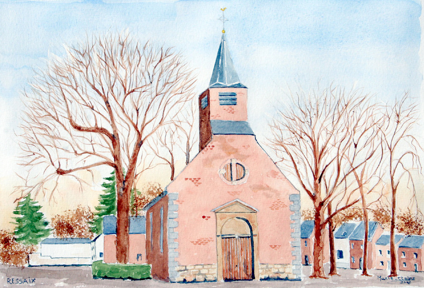 Ressaix (Belgique), l’église Saint-Etienne